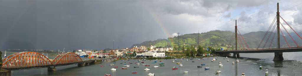 Vista de Colindres, municipio de la comunidad autónoma de Cantabria (España).